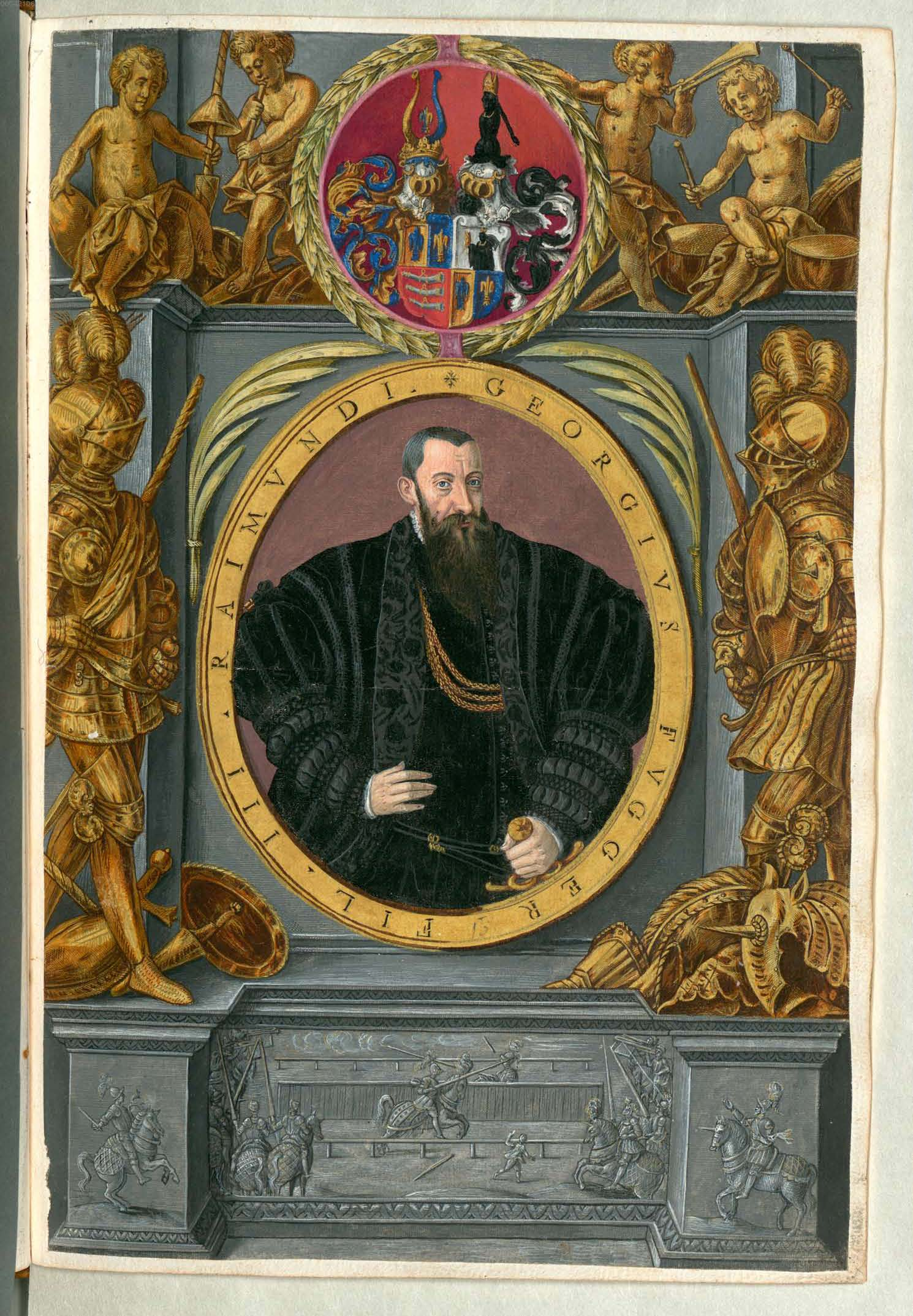 Fuggerorum et Fuggerarum imagines wurde 1588 von Philipp Eduard Fugger beim Kupferstecher Dominicus Custos in Auftrag gegeben. Das Werk enthält mit Aquarell- und Gouache-Farbe kolorierte Stiche der Mitglieder der Fugger von der Lilie. Der Druck von 1618 stellt das einzige kolorierte Exemplar dar. Georg Fugger (1518-1569), Sohn Raymund Fuggers (1489-1535)